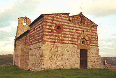 Pieve romanica dei SS.Ippolito e Cassiano - Colle di Val d'Elsa